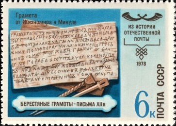 Почтовая марка СССР. 1978. История отечественной почты. Берестяные грамоты. Номер в каталоге ЦФА 4919